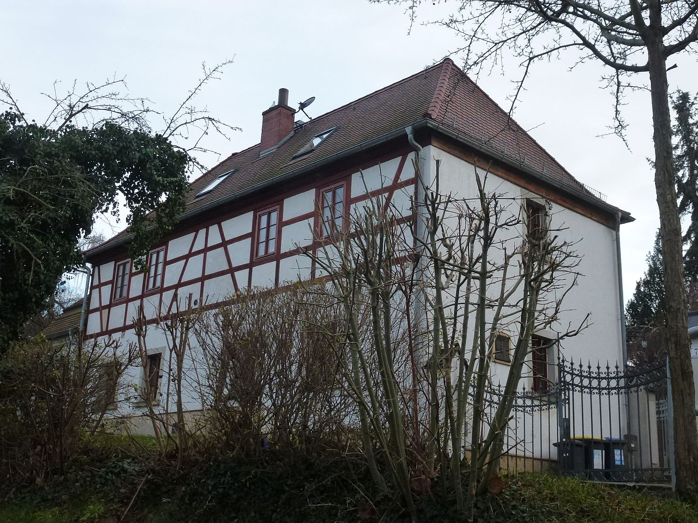 Ehem. Schule an der Hainkirche in Hänichen